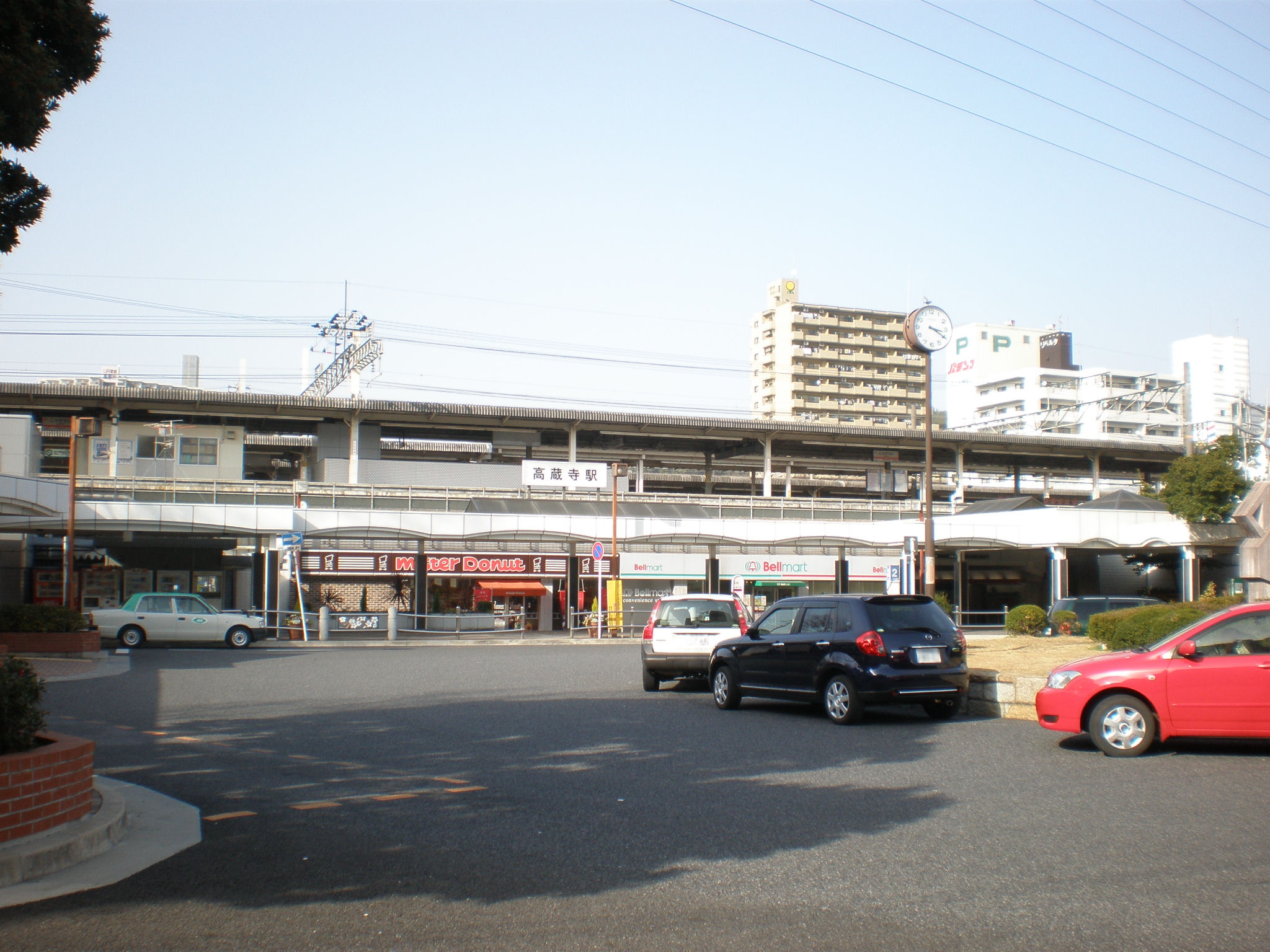 愛知県春日井市にある高蔵寺駅